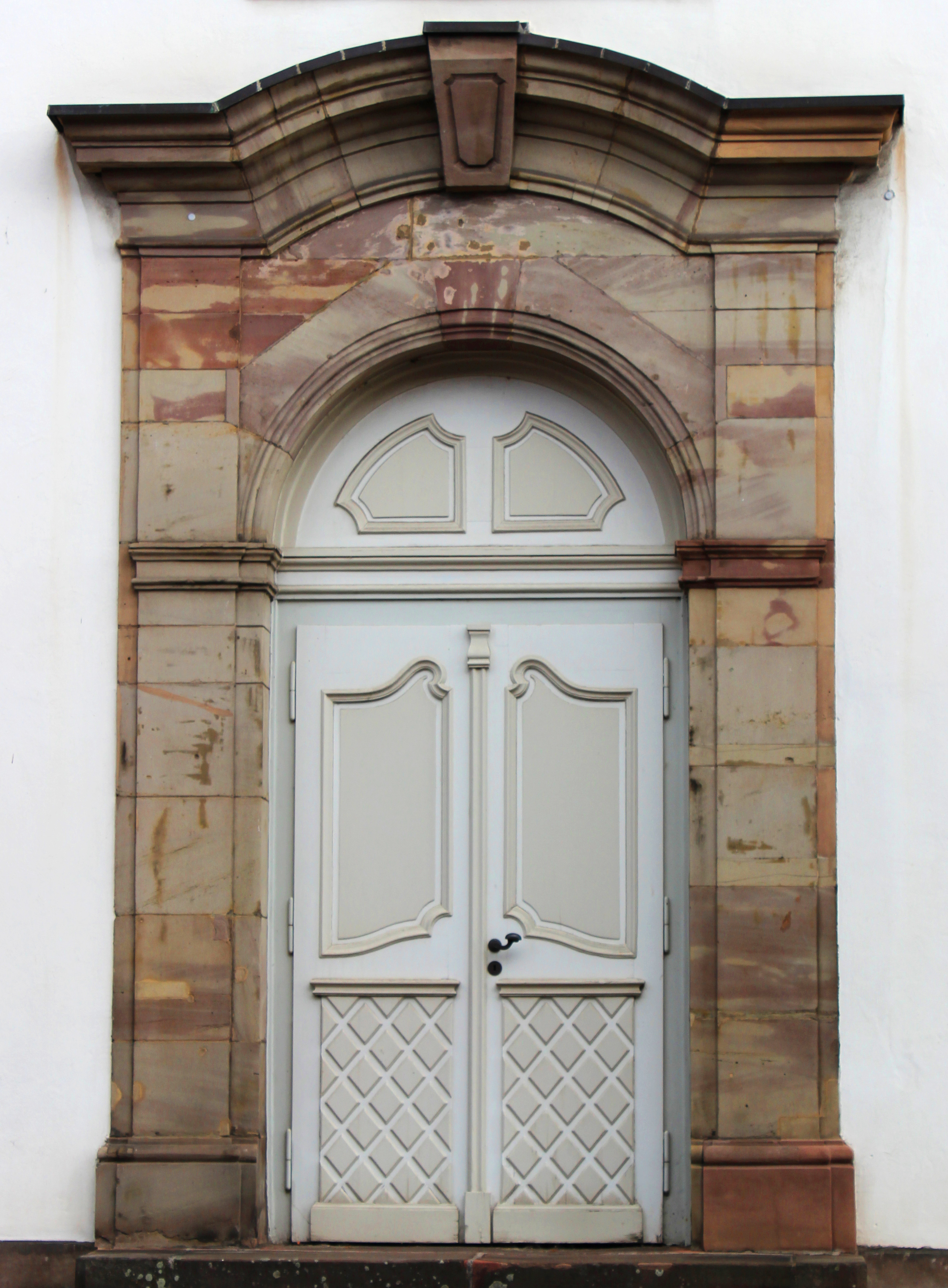 Portal der evangelischen Kirche in Gersweiler, einem Stadtteil der saarländischen Landeshauptstadt Saarbrücken